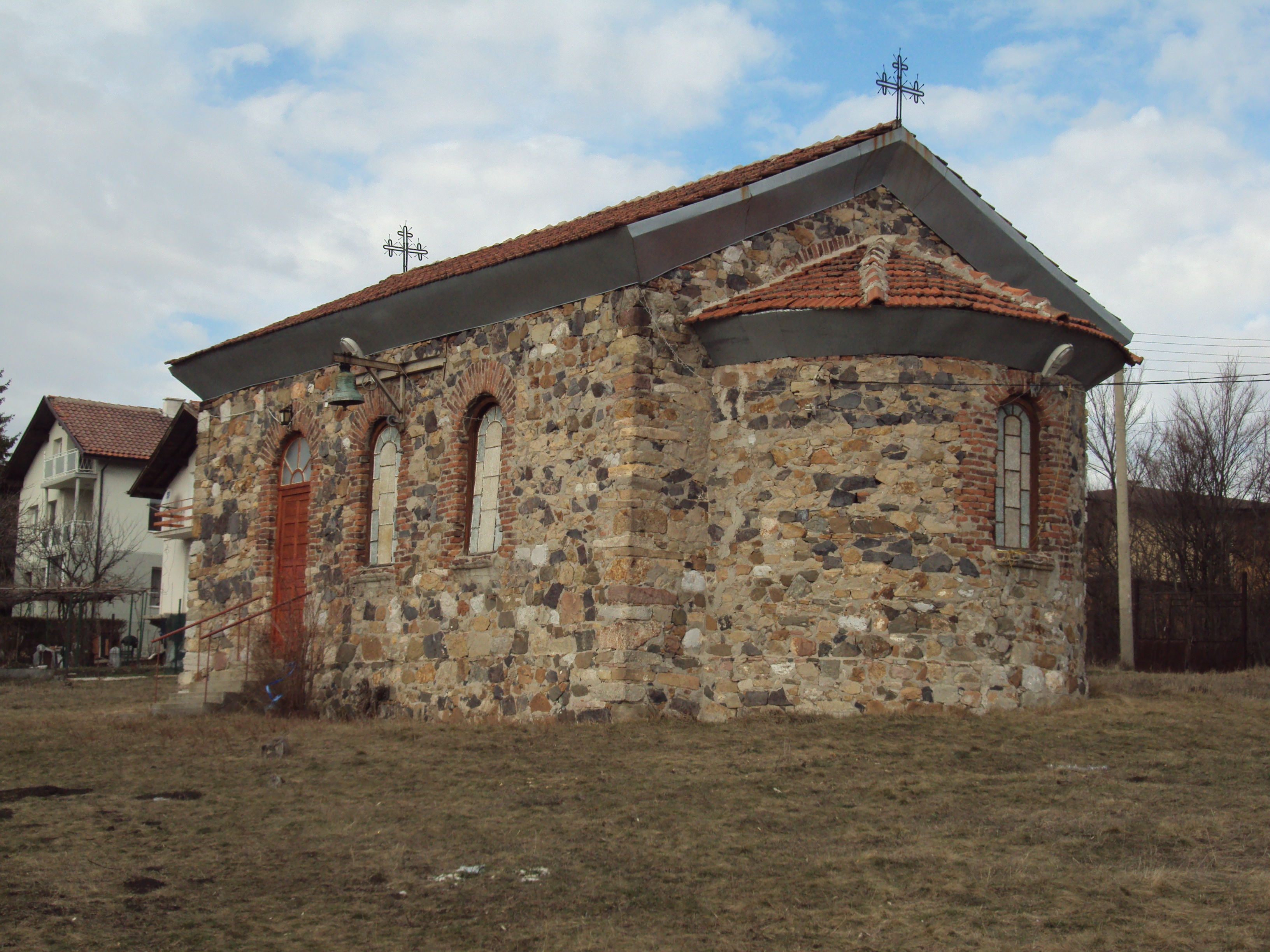 Църквата